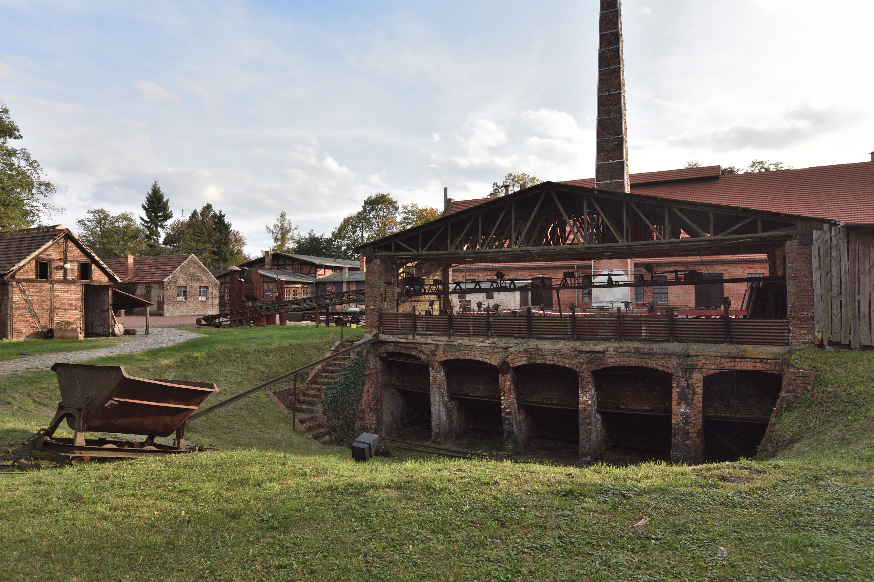 Historischer Gasgenerator der Glashütte im Museumsdorf Glashütte (Baruth/Mark)